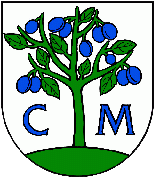 erb obce Nová Bošáca